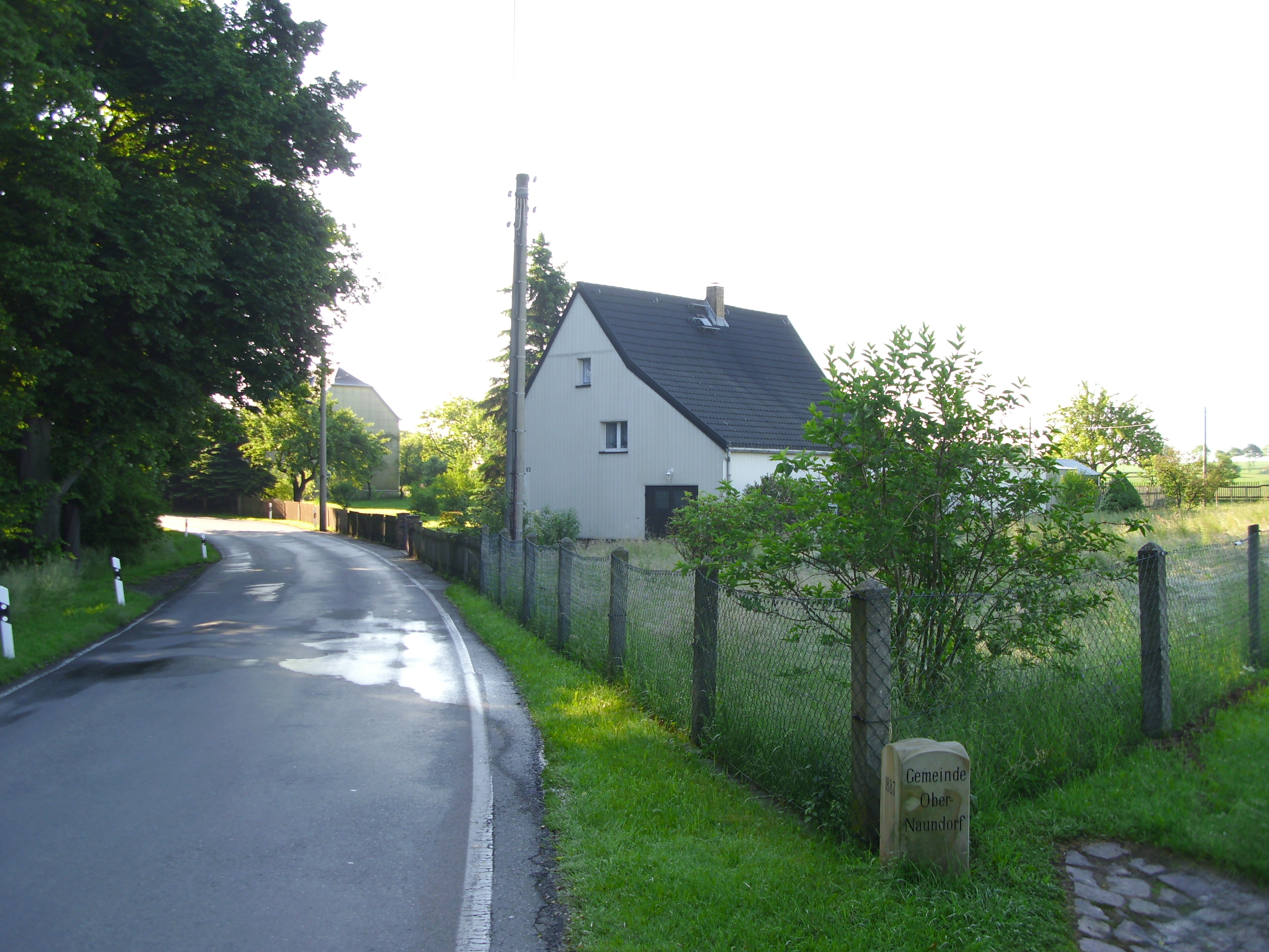 Diese zu Wilmsdorf gehörenden Drescherhäuser grenzen unmittelbar an die von Obernaundorf. Im Vordergrund steht der Gemeindegrenzstein, welcher beide voneinander trennt.